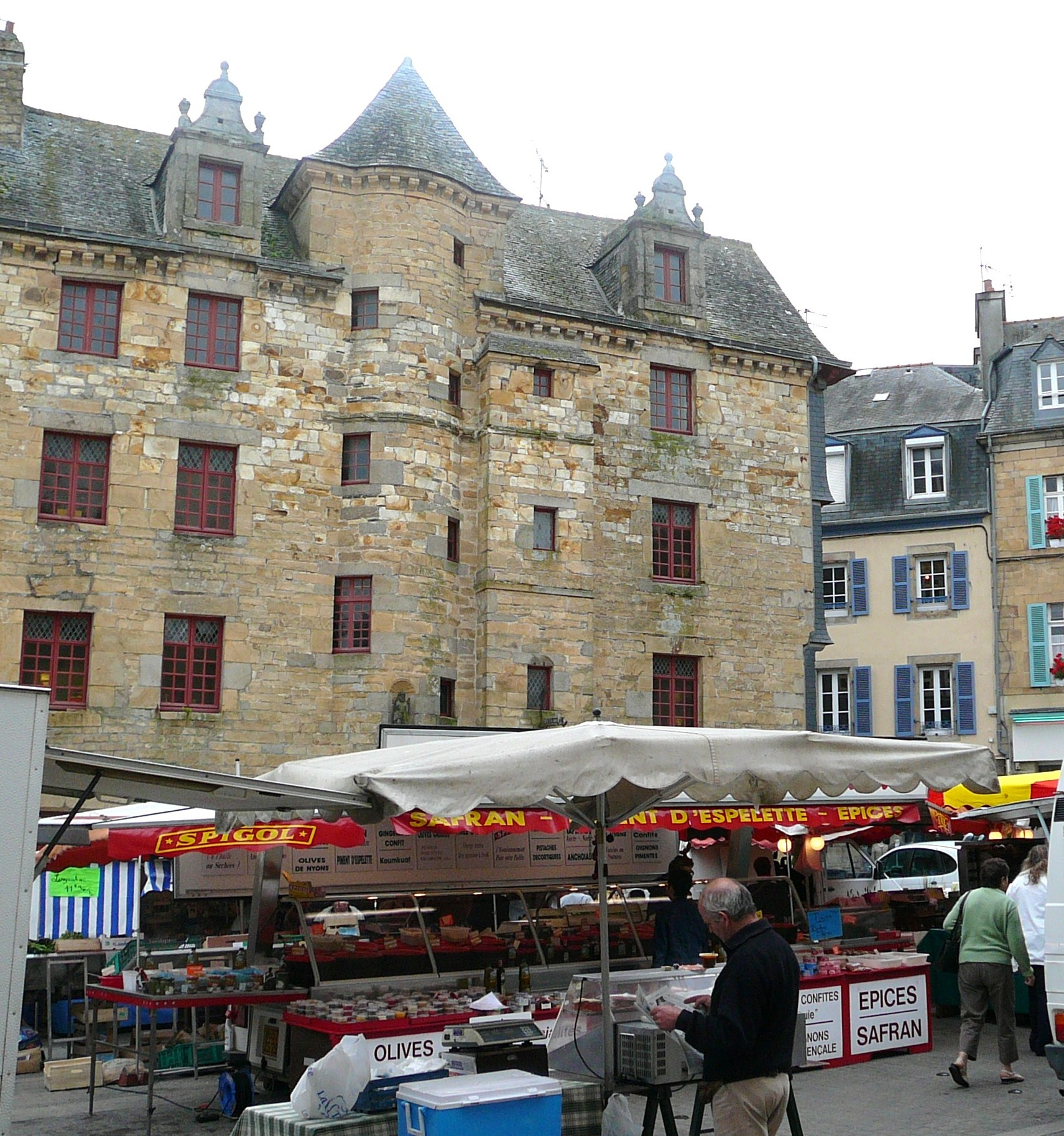 Landerneau : maison de la sénéchaussée à façade d'ardoises (ou maison de la Duchesse Anne ou hôtel de Rohan), place du marché. Construite en pierre de Logonna, elle date de 1664